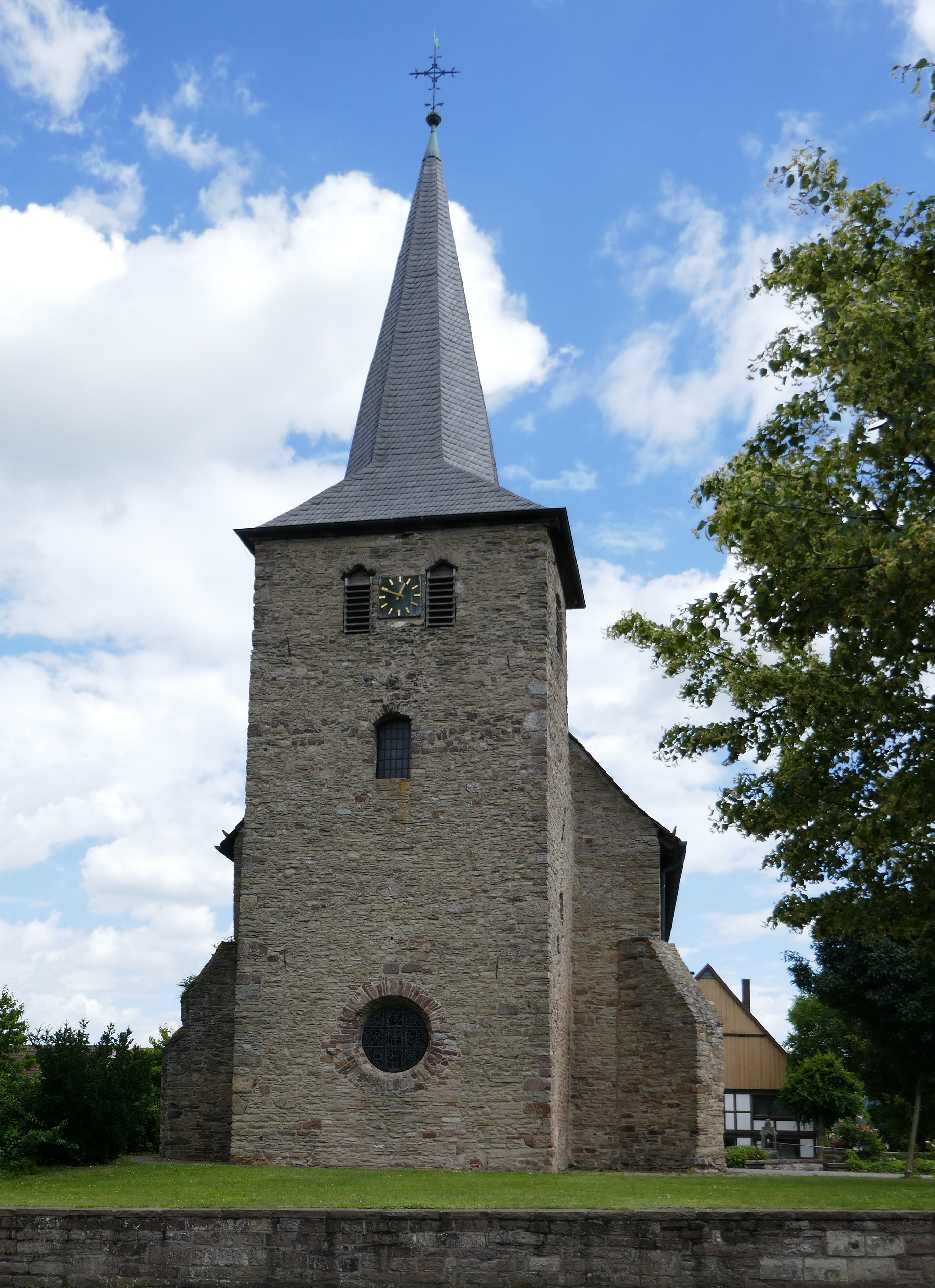 St. Peter- und Paul in Sommersell